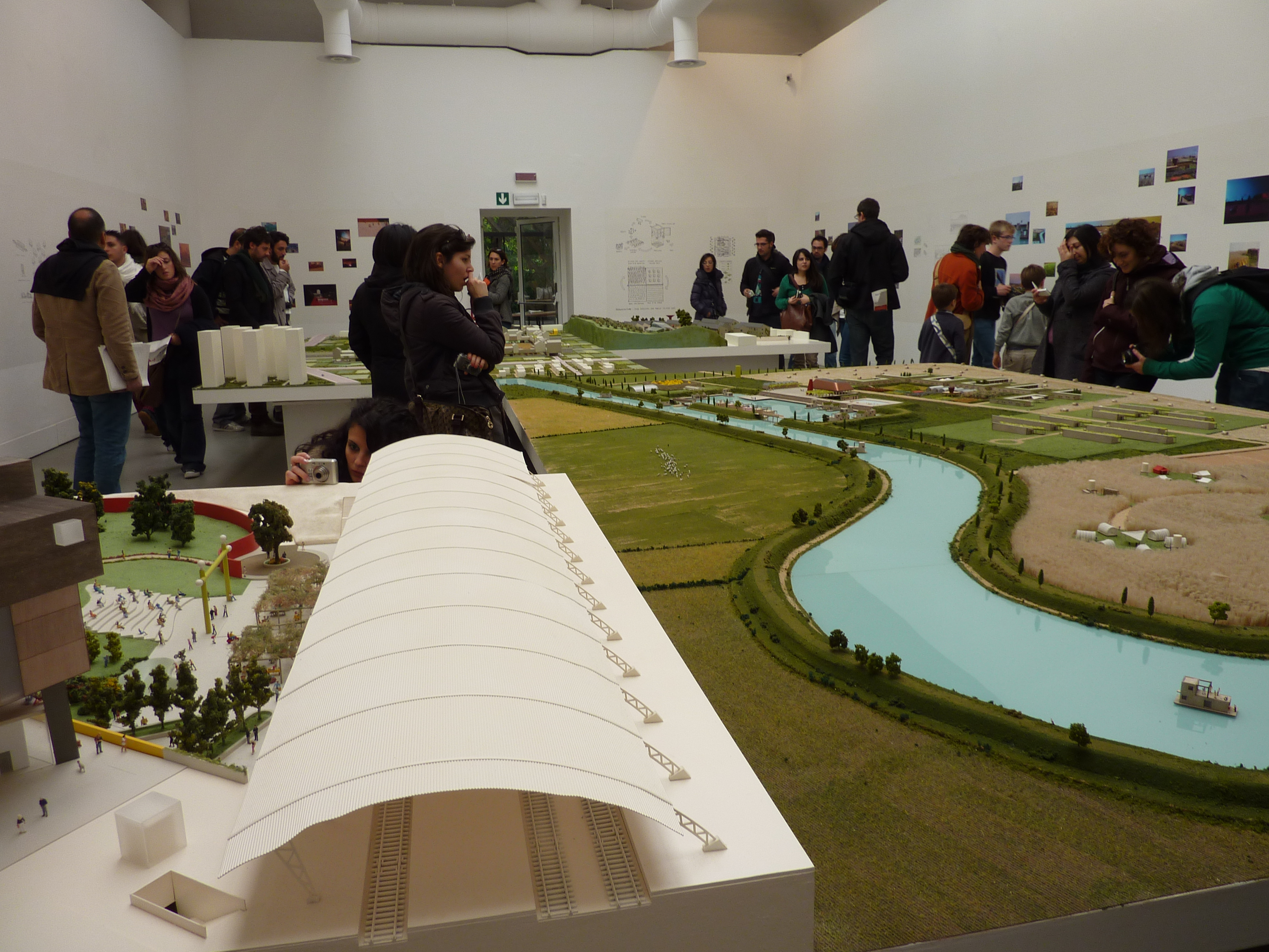 Travail proposé par Aldo Cibic lors de la Biennale de Venise en 2011